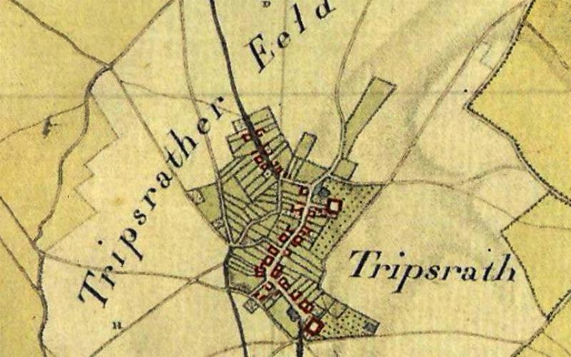 Kartenaufnahme der Rheinlande 1803-1820